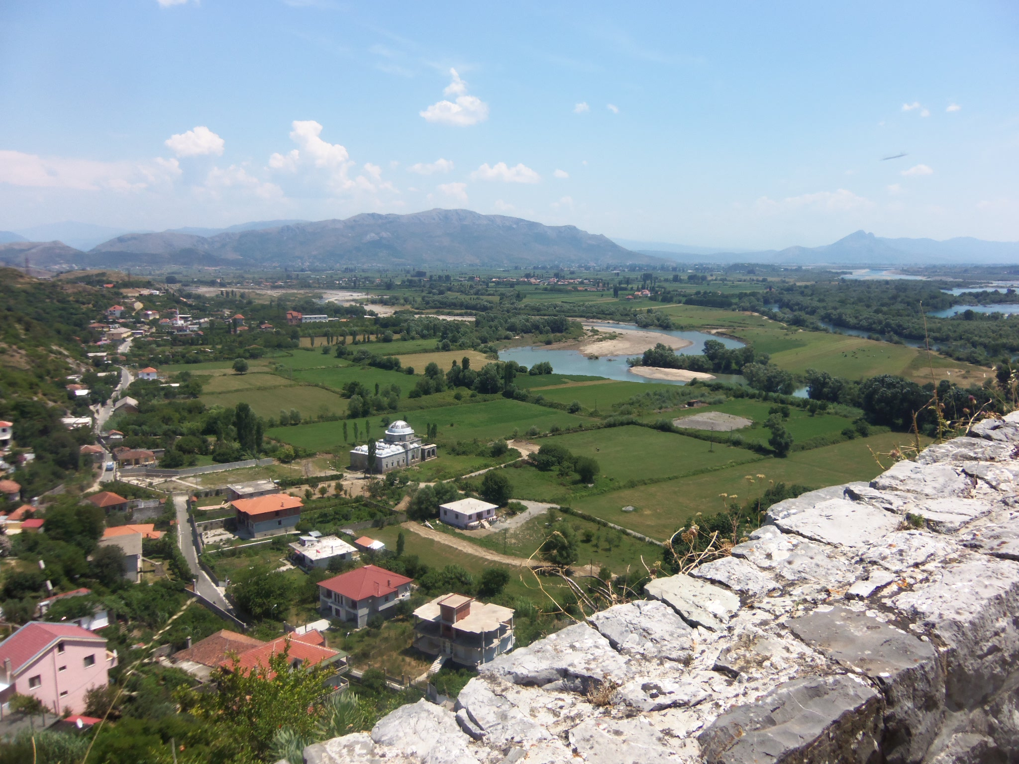 Blick von der Burg Rozafa auf die Bleimoschee